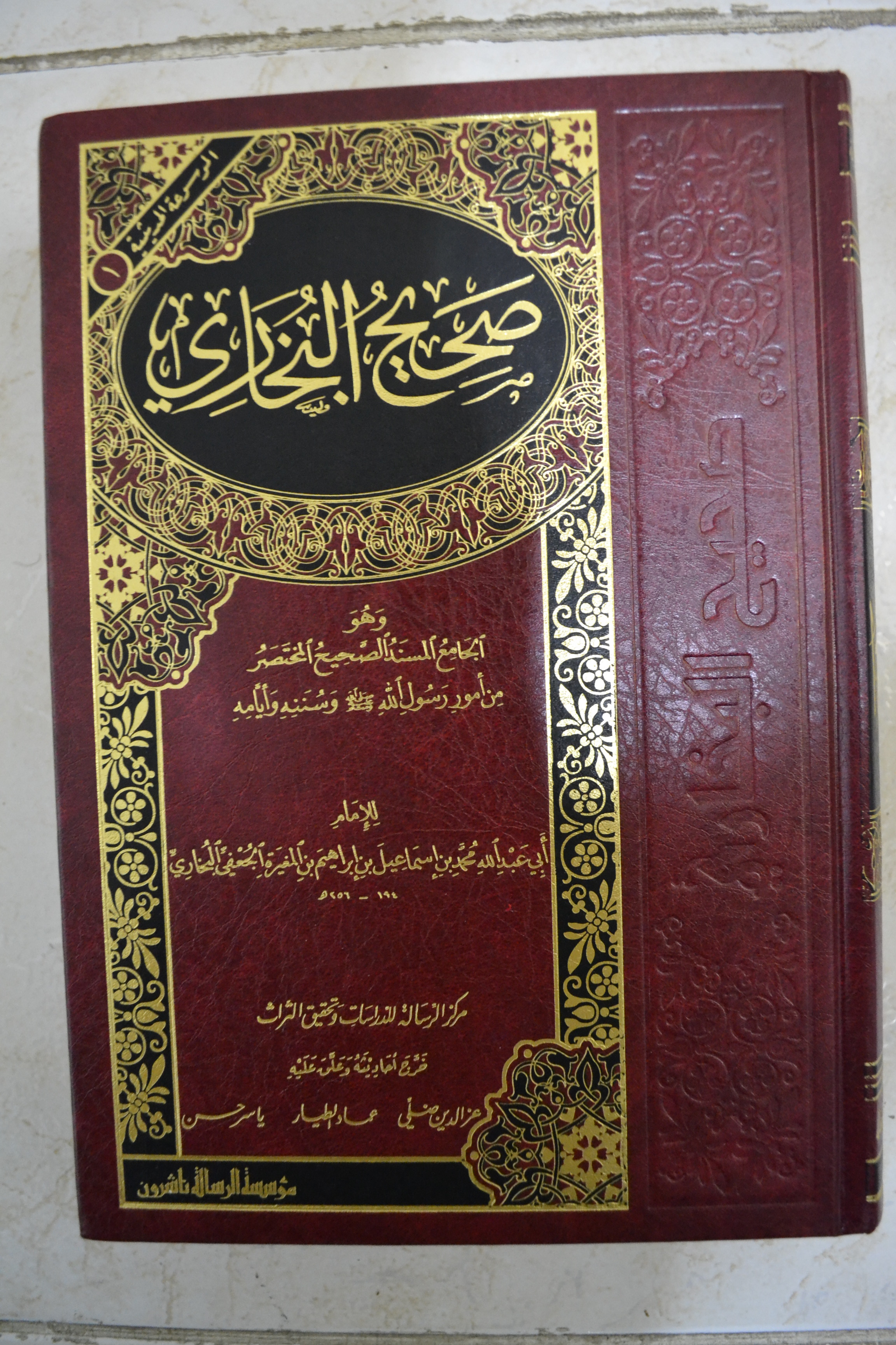 Kitab ini ditulis oleh Imam al-Bukhari